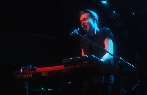 Douglas Dare podczas koncertu w Eskulapie w Poznaniu